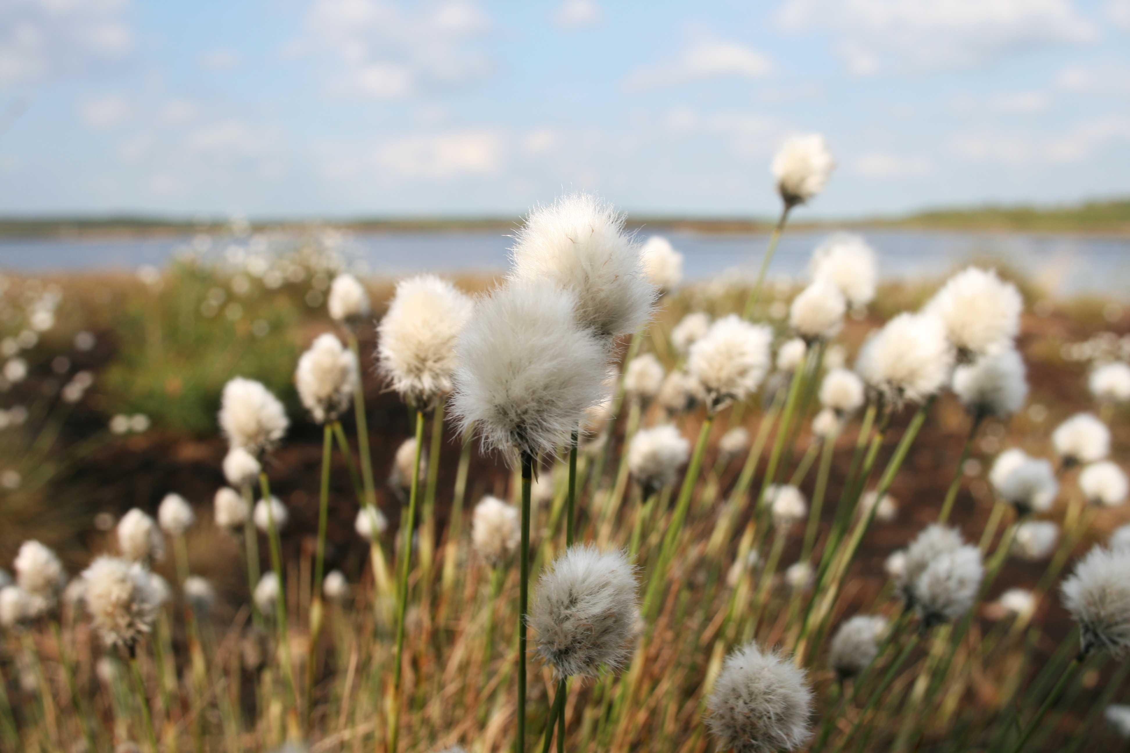 Wollgras (Eriophorum sp.) im Himmelmoor bei Quickborn, Kreis Pinneberg, Schleswig-Holstein. Bereich im Landschaftsschutzgebiet „LSG des Kreises Pinneberg“ (LSG 01).